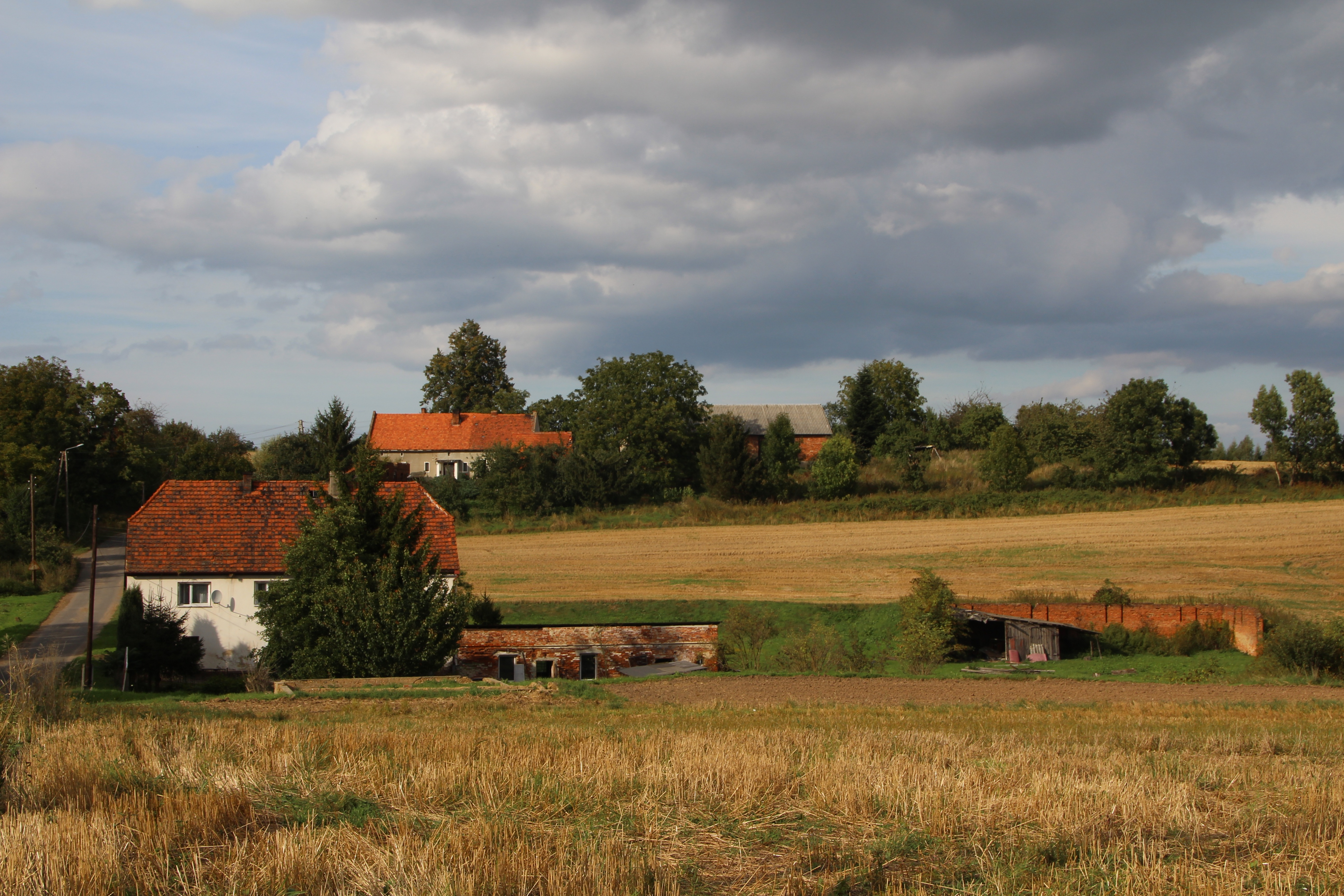 Karłowice Małe – wieś w Polsce położona w województwie opolskim, w powiecie nyskim, w gminie Kamiennik.